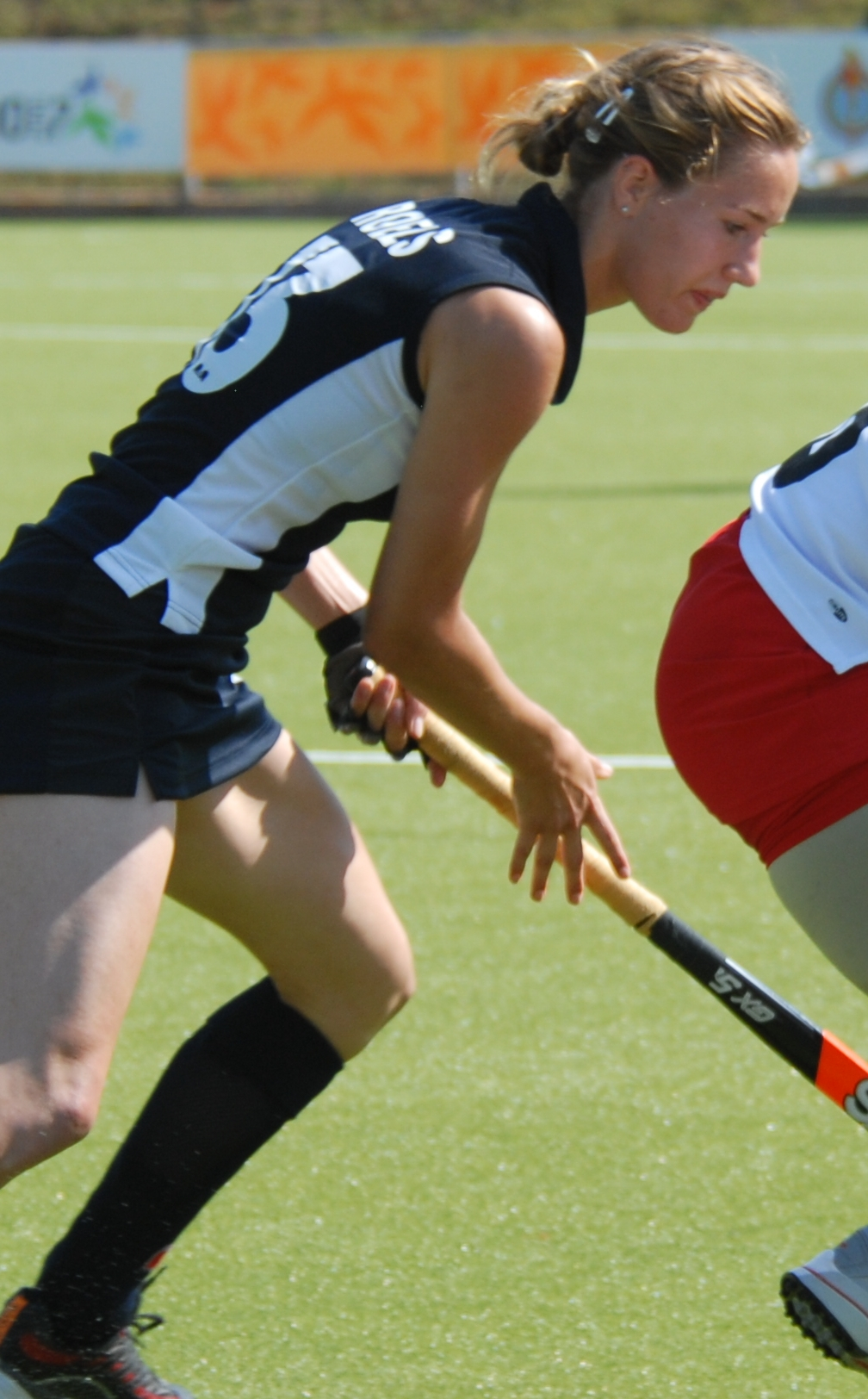 Pauline Roels